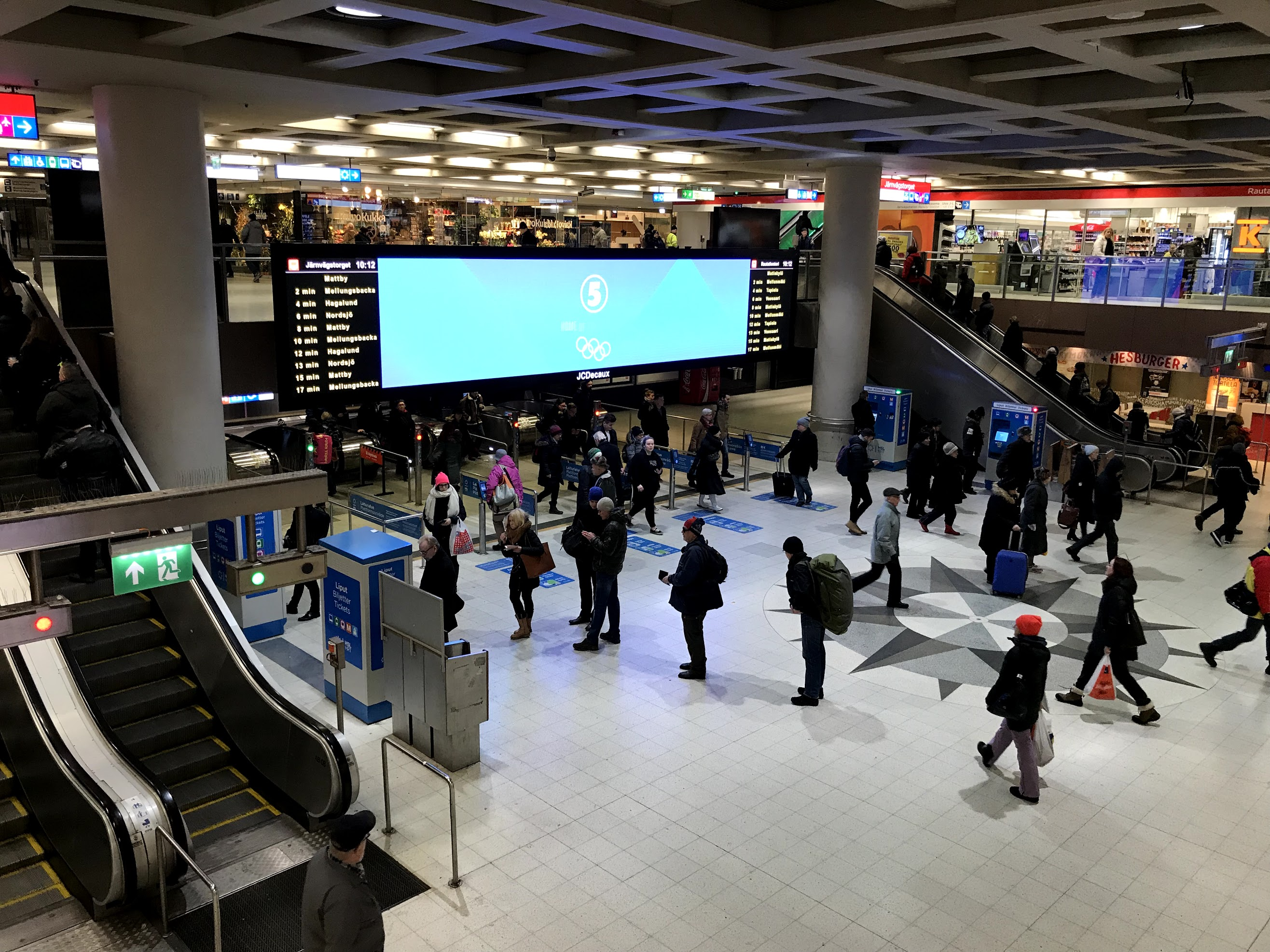 ラウタティエントリ駅のコンコース